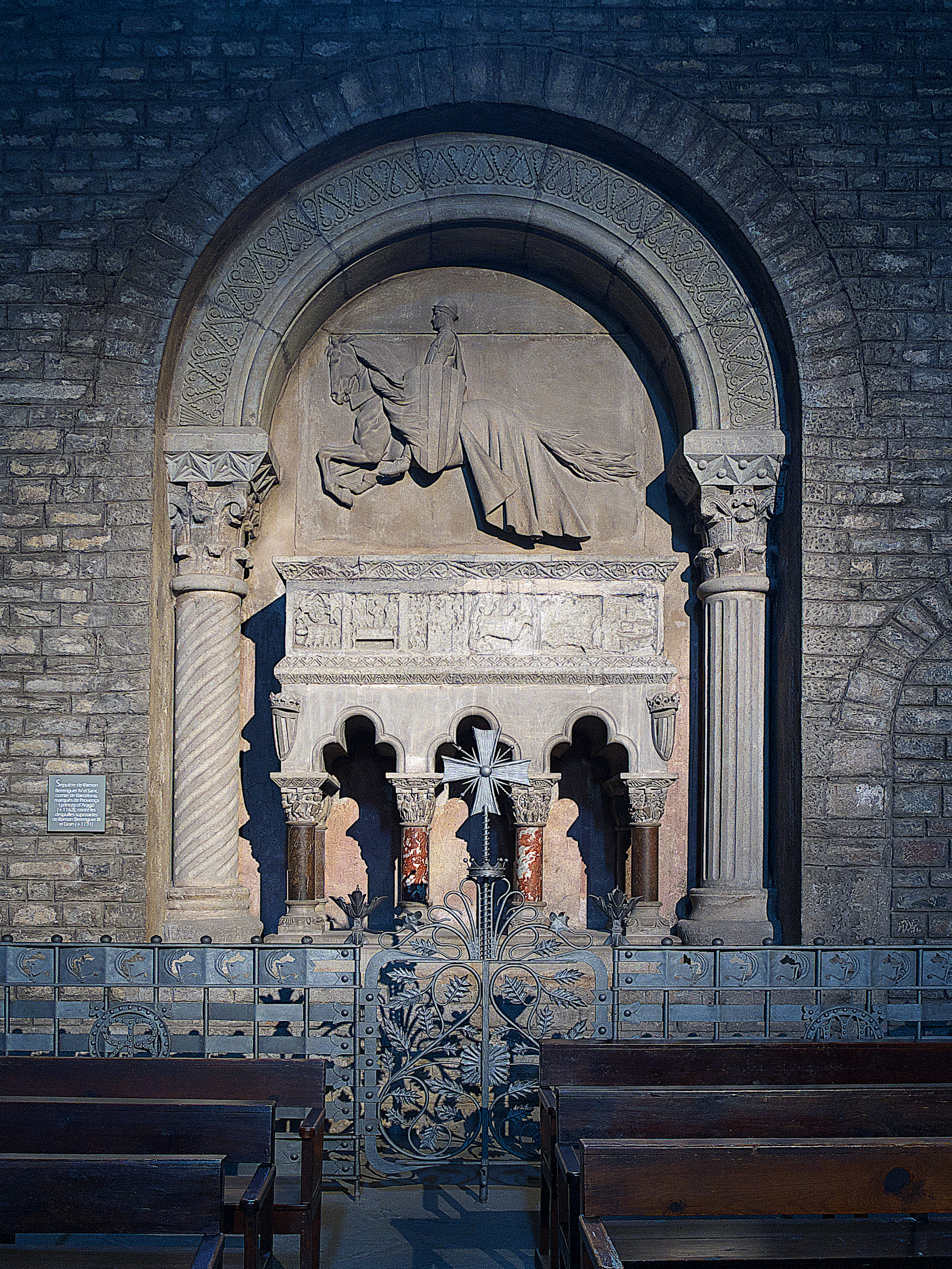 Monasterio de Santa María de Ripoll. Fallecido en 1131, se conserva el sarcófago primitivo (s. XII)